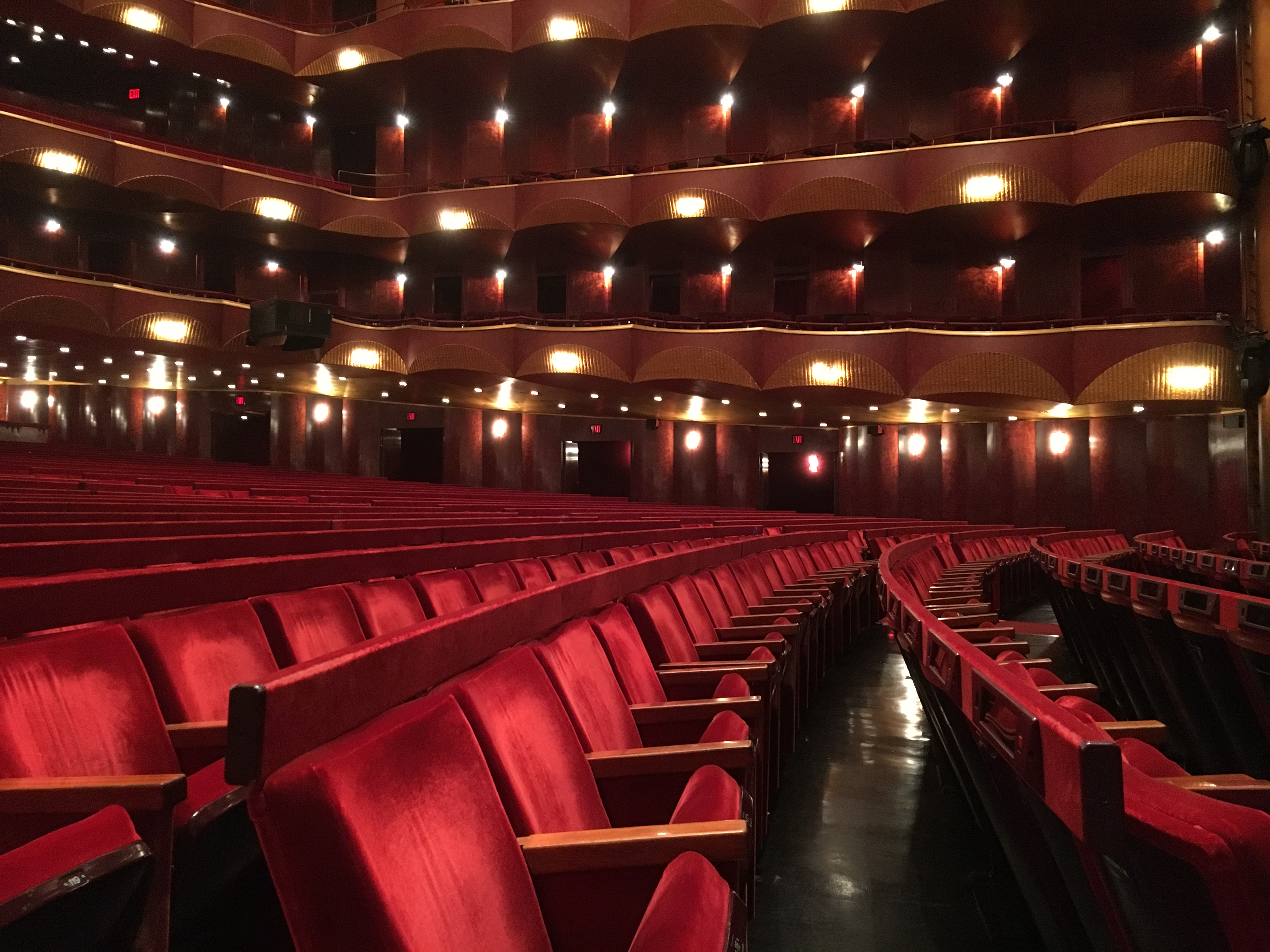 Site: Metropolitan Opera